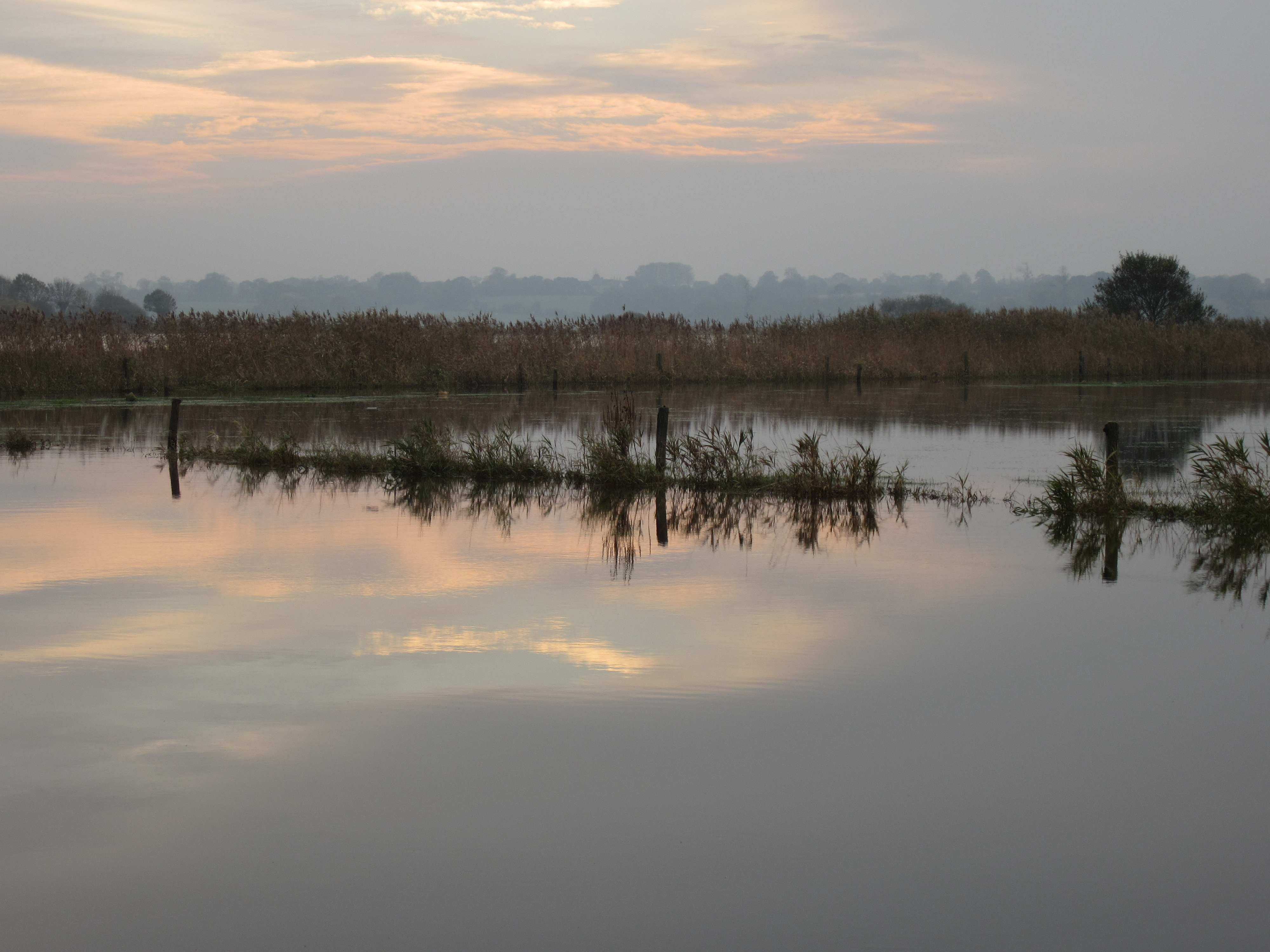 Liesville-sur-Douve, Manche